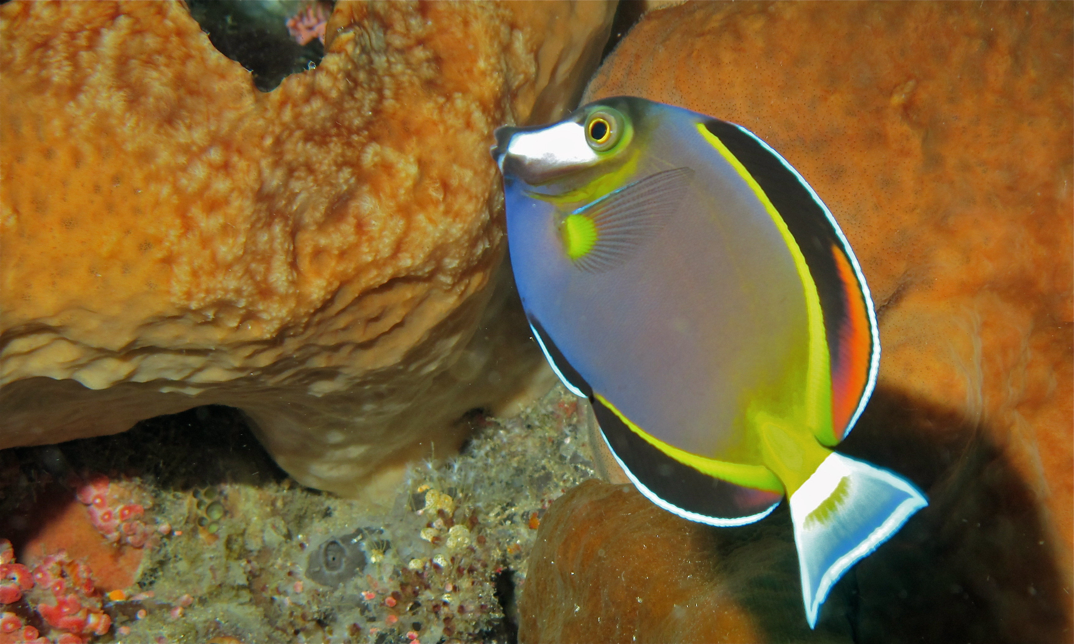 Likuan I, Bunaken Island, Sulawesi, INDONESIA